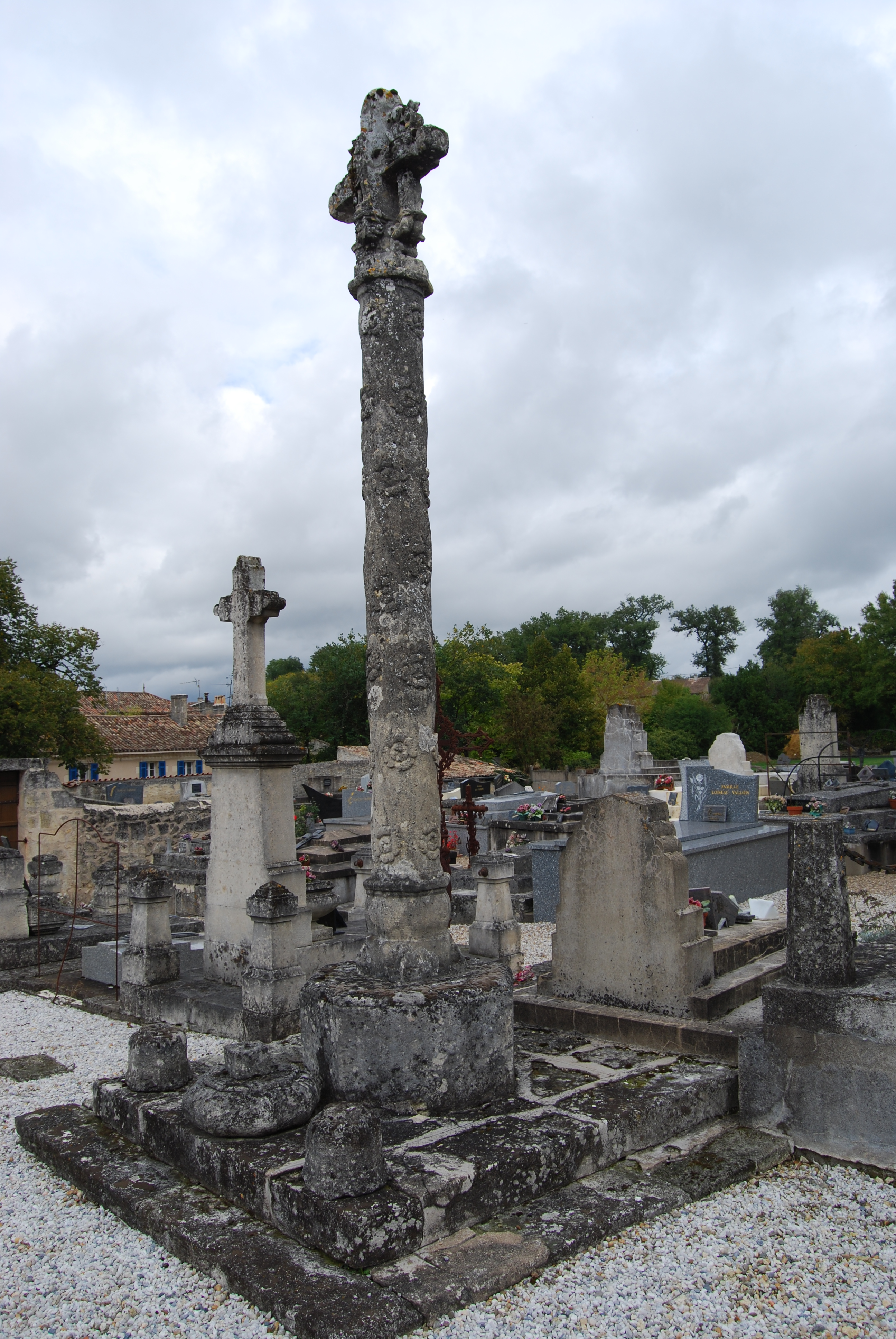 Croix, (Inscrit, 1925) .